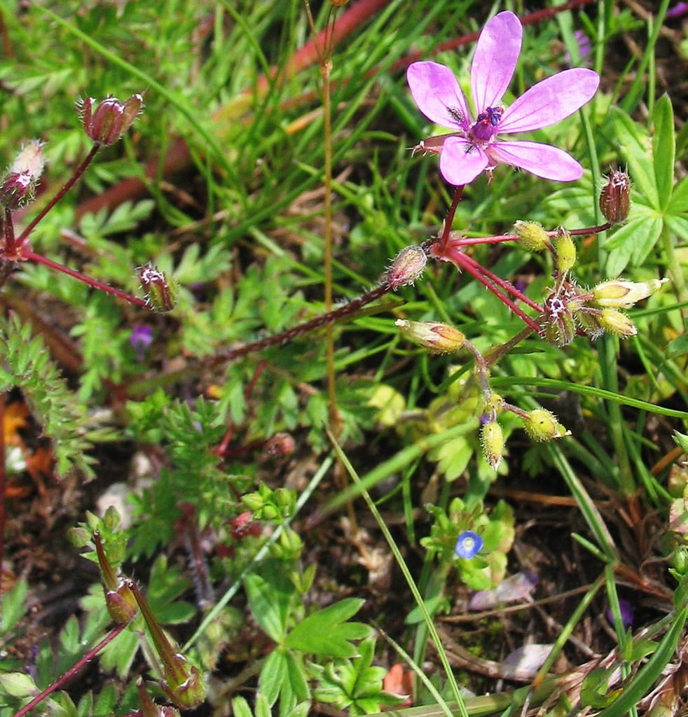 Beschreibung: Gewöhnliche Reiherschnabel (oder häufig auch Schierlingsblättriger Reiherschnabel genannt) (Erodium cicutarium) Fotograf: Darkone, 14. Mai 2005